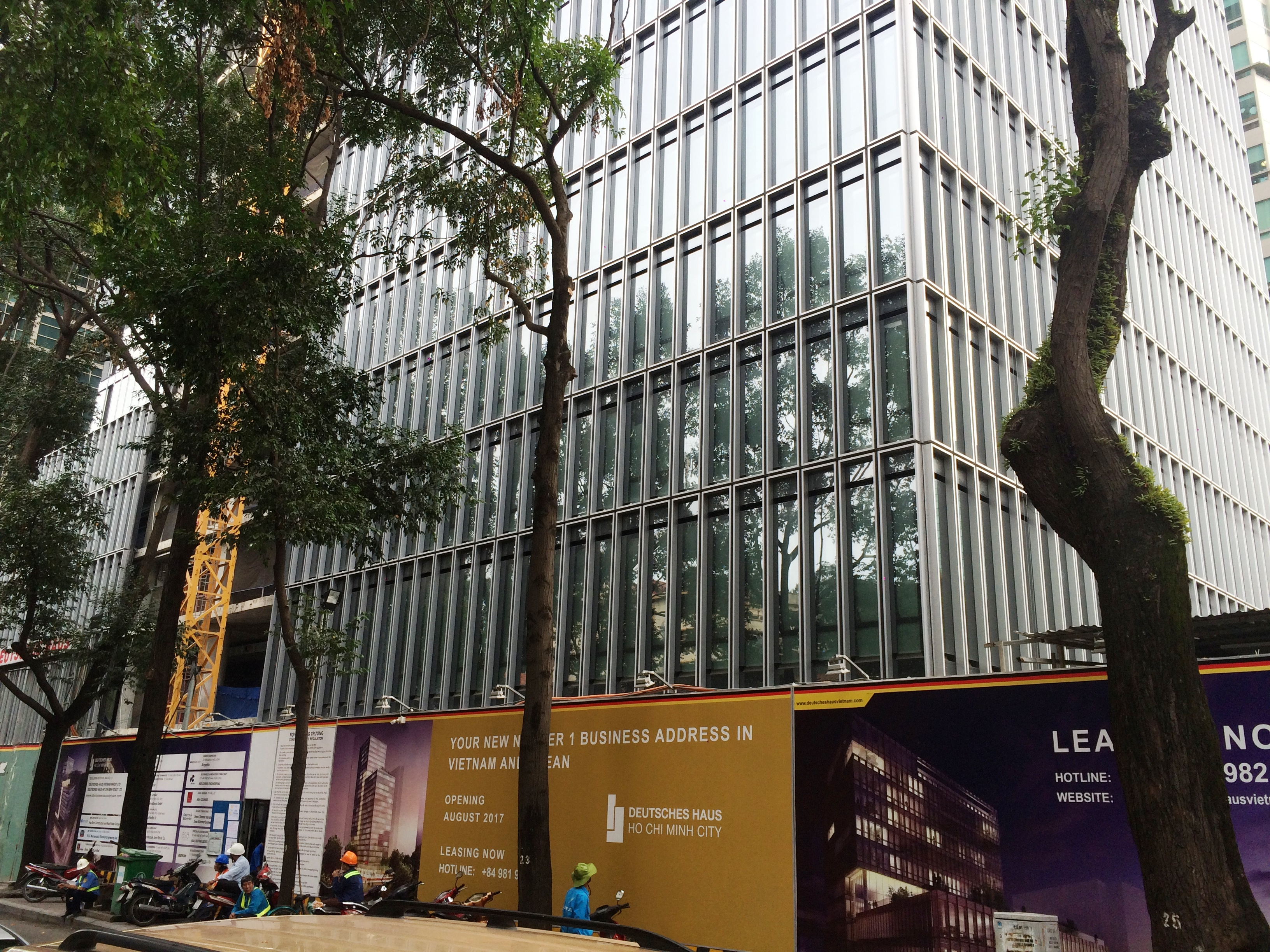 2017-02-03, Deutsches Haus HCM, Aussicht von der Straße II